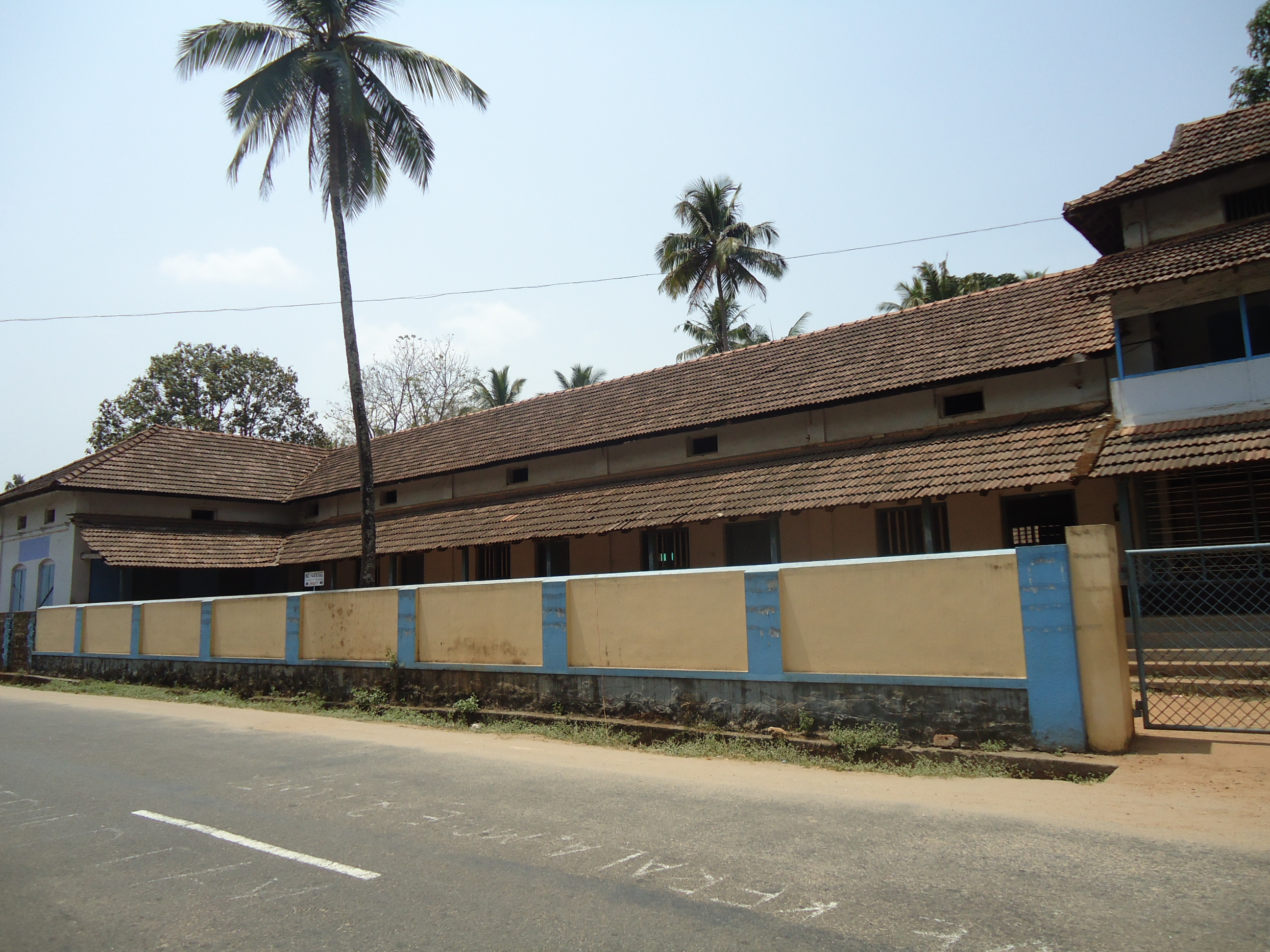 SNDP High School Neeleeswaram 1